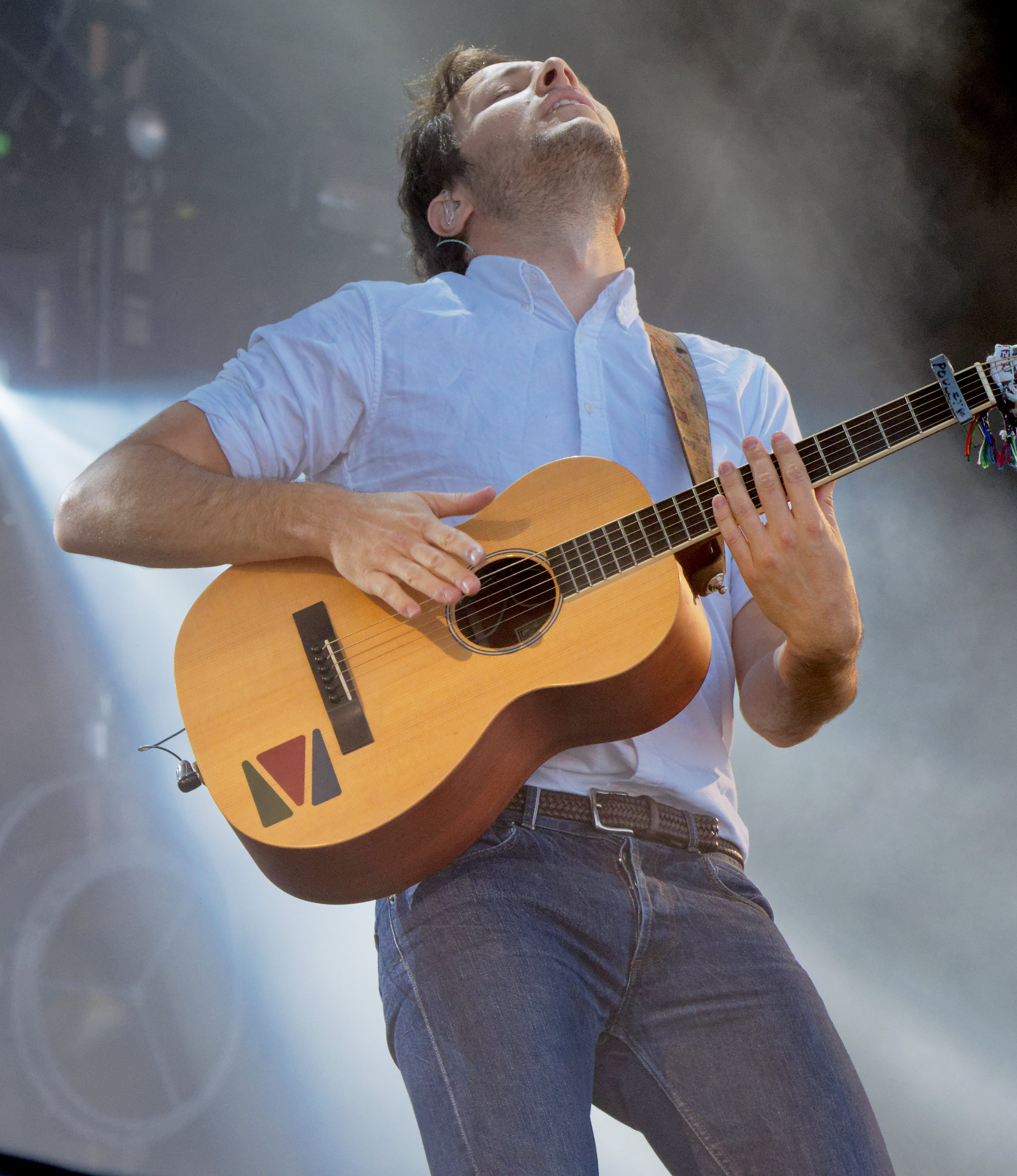 Vianney en concert lors du festival des vieilles charrues 2017.